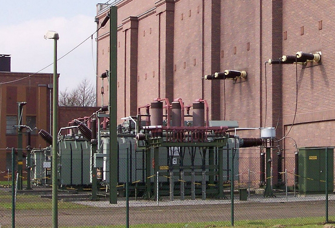 Umspannwerk Recklinghausen, Hochspannungsleistungstransformator